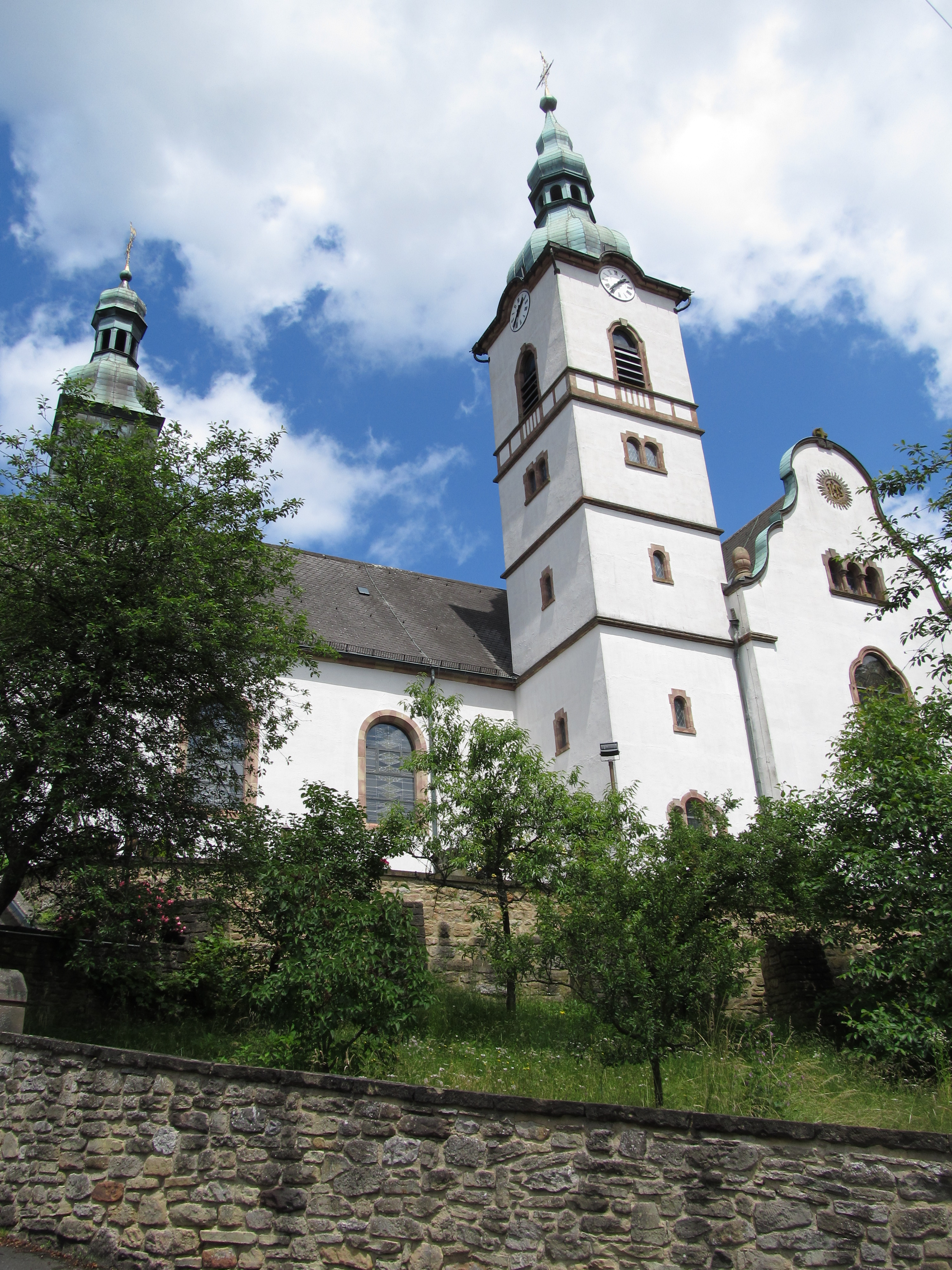 Die St. Peterskirche in Ensheim, Saarland